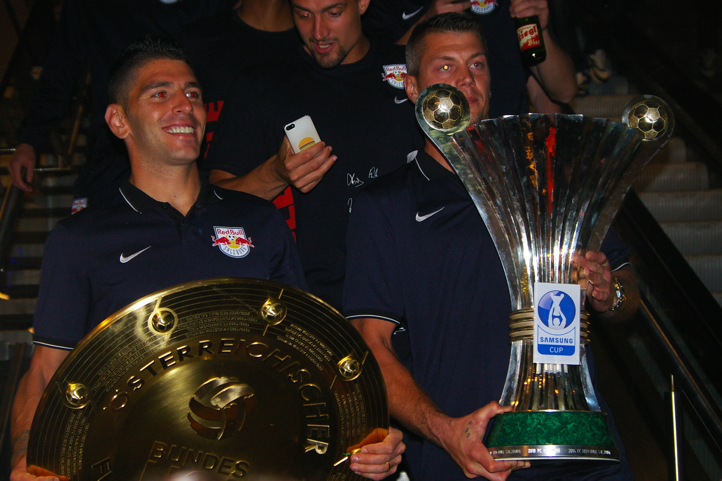 Endspiel des ÖFB Cups gegen Austria Wien 2:0 Die Mannschaft reiste ihm Fanzug zurück nach Salzburg